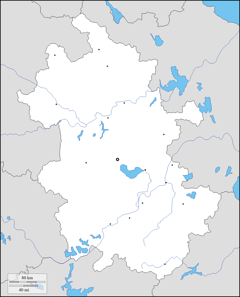 中国安徽省地理位置图。来源：OpenStreetMap